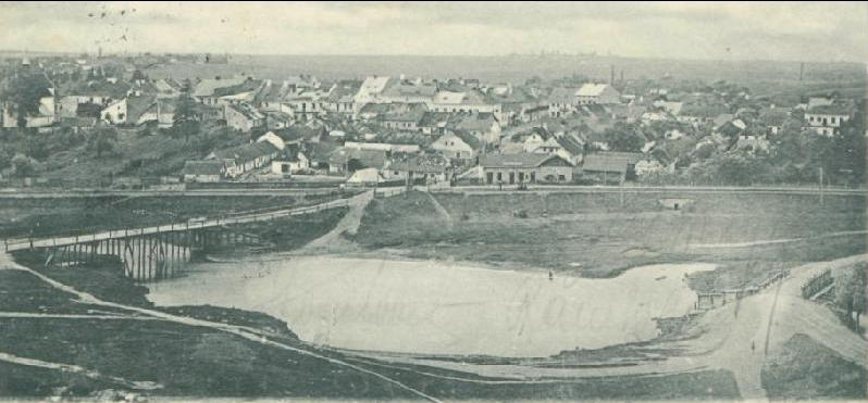 Вид на Щирець, початок XX ст.